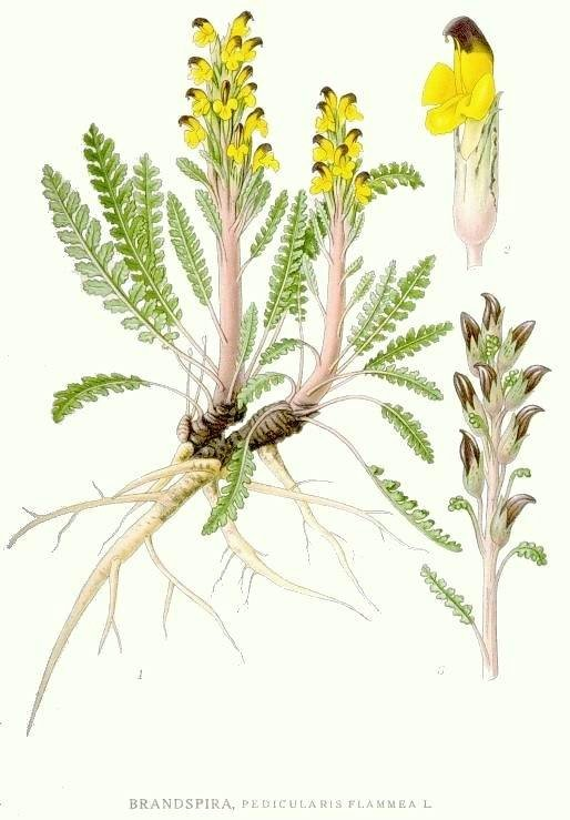 Original Description Brandspira, Pedicularis flammea L.